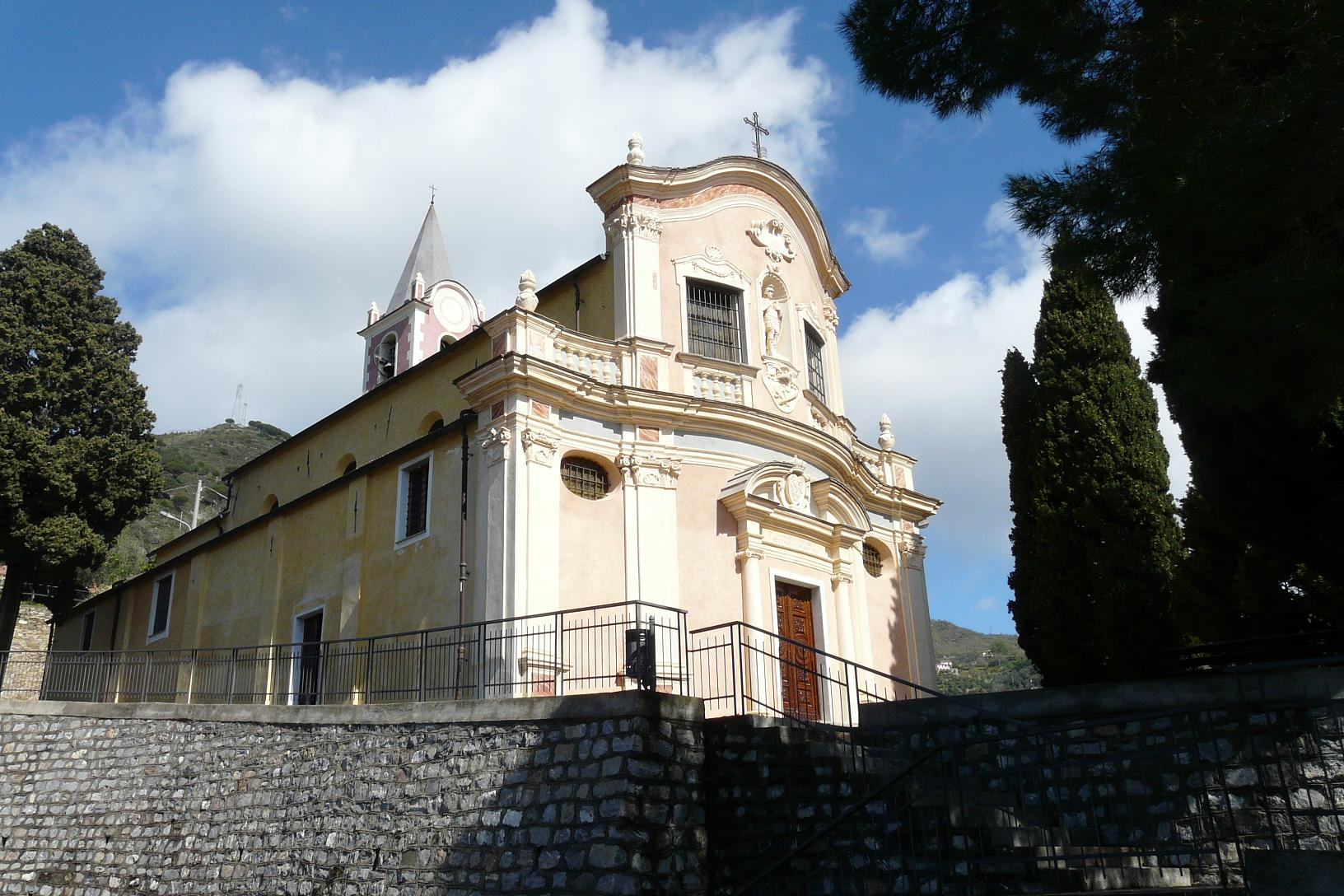 Chiesa di San Sebastiano, Moglio, Alassio, Liguria, Italia